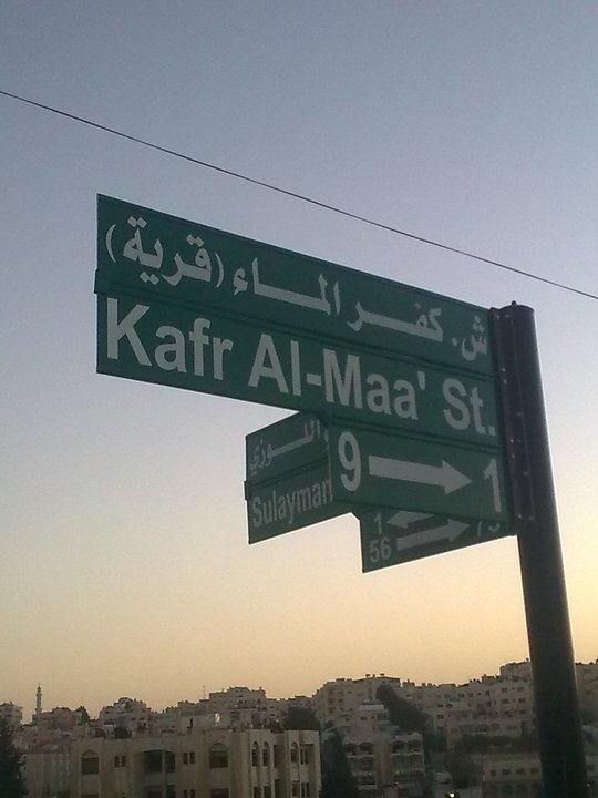 شارع في العاصمة عمان يحمل اسم كفر الماء